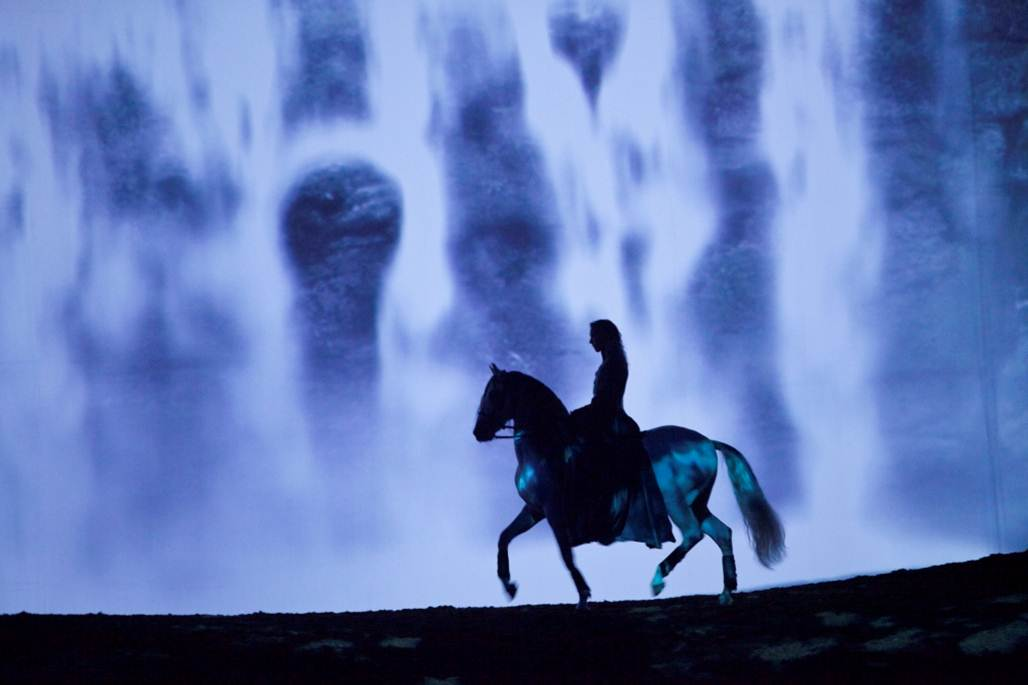 Spectacle Odysséo de Cavalia, Laval, Québec, Canada.